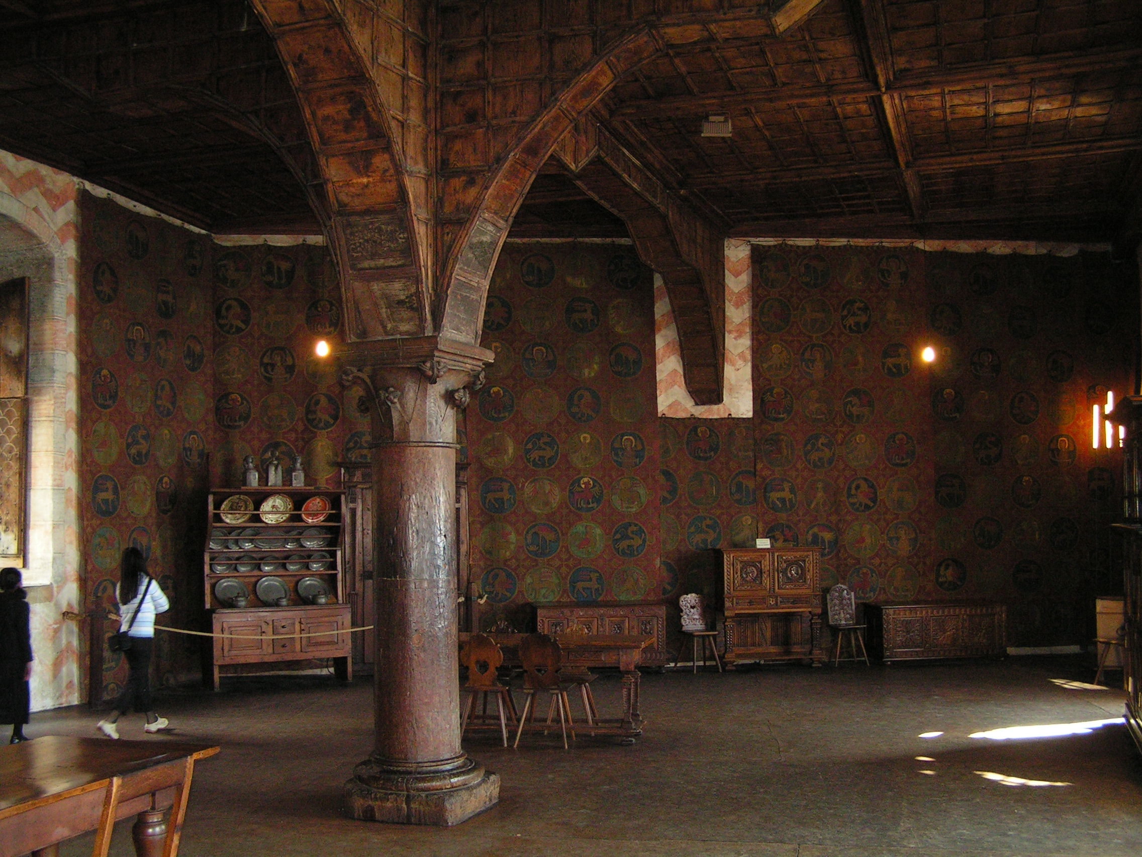 Saal im Schloss Chillon, Veytaux-Montreux, Schweiz